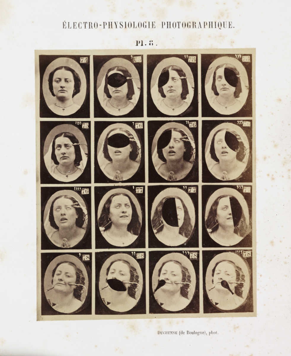 Электро-физиологическо-фотографические эксперименты Дюшена